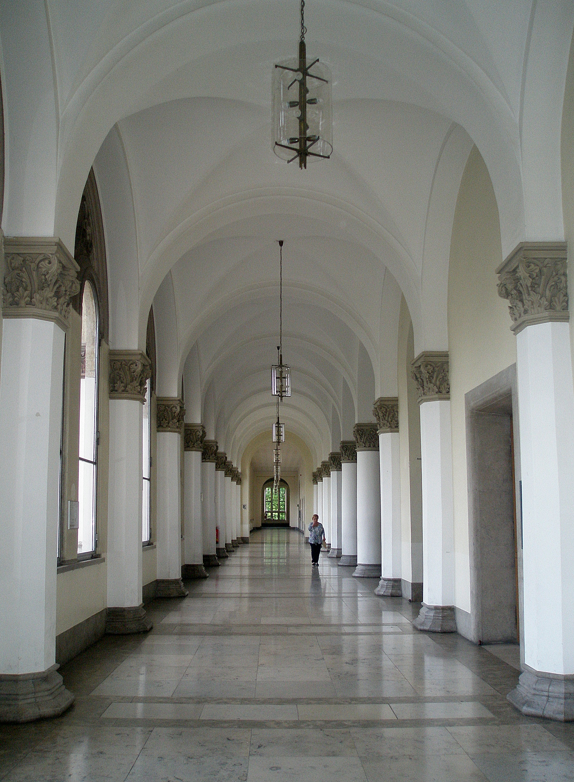 LMU, Gang 1. OG